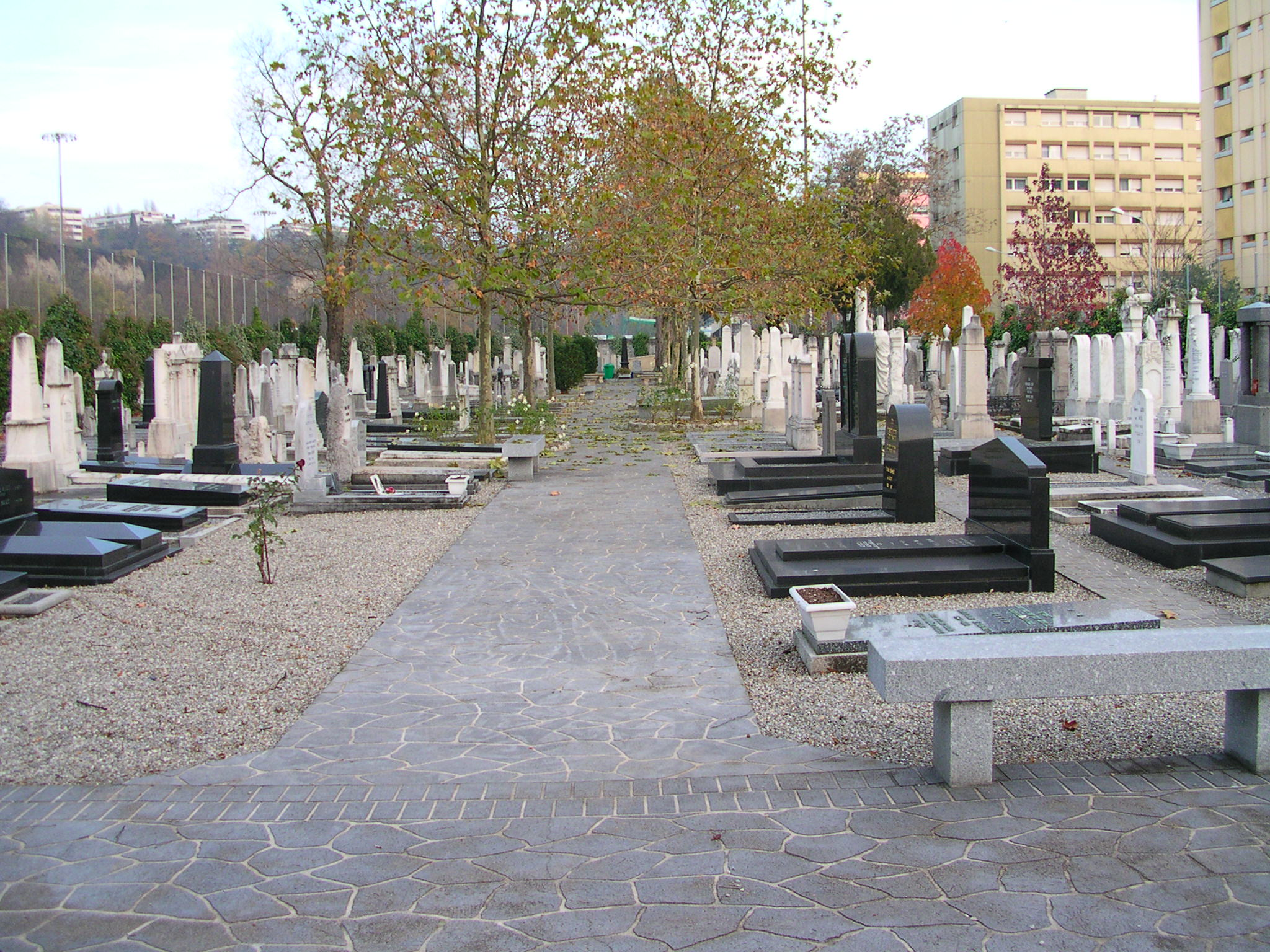 Vue générale du cimetière depuis l'entrée principale